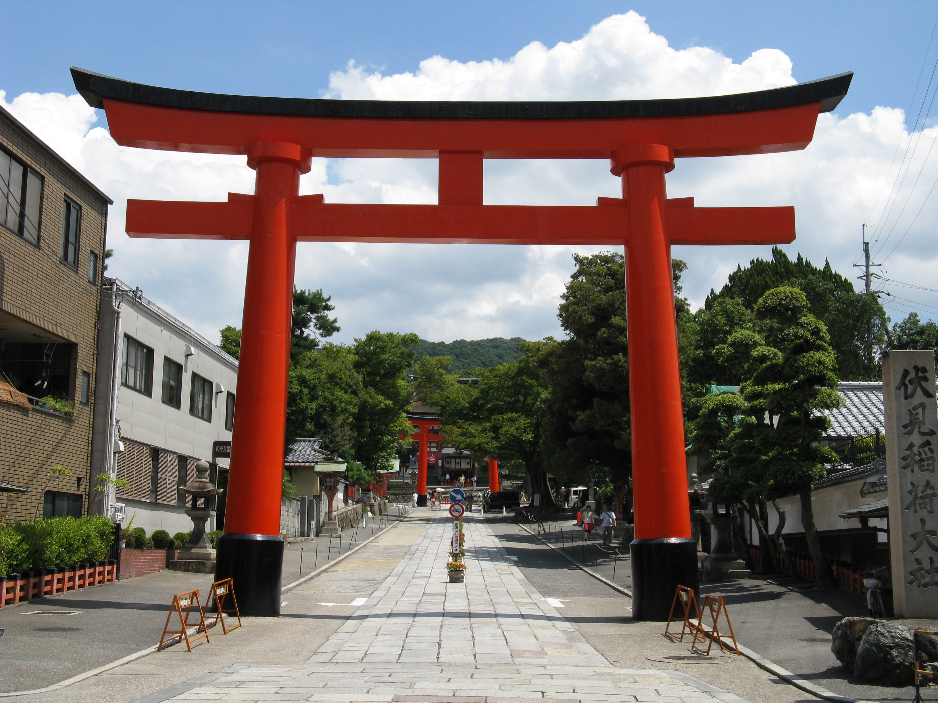 伏見稲荷大社 表参道